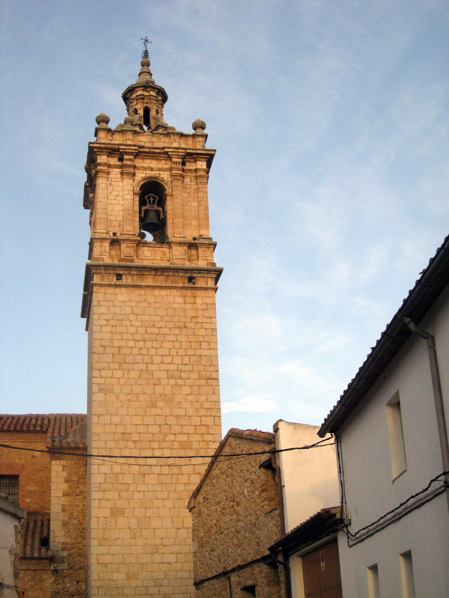 Església parroquial de l'Assumpció (Albocàsser) 02.003-009.